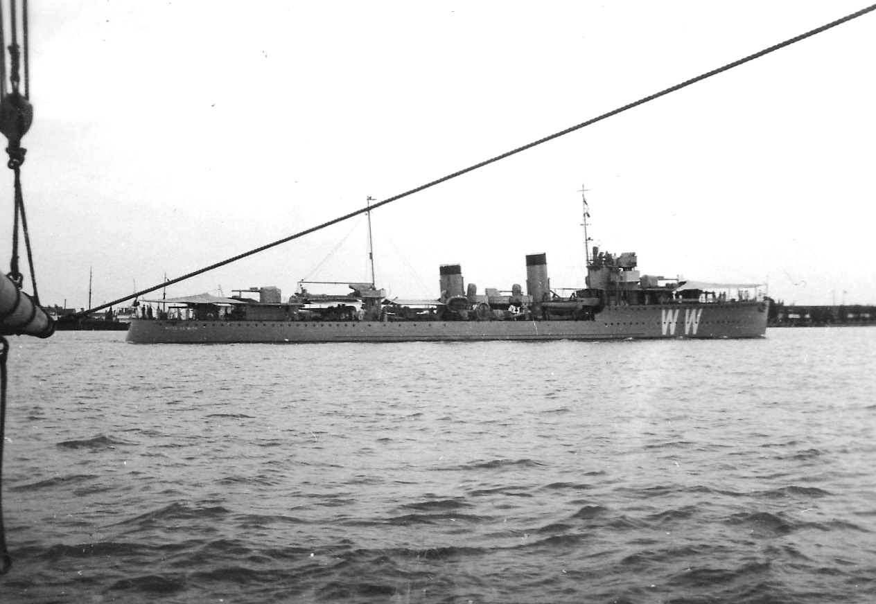 H.M. Witte de With in 1935 in Nederlands-Indië